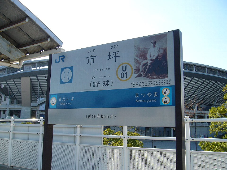 予讃線市坪駅の駅名標